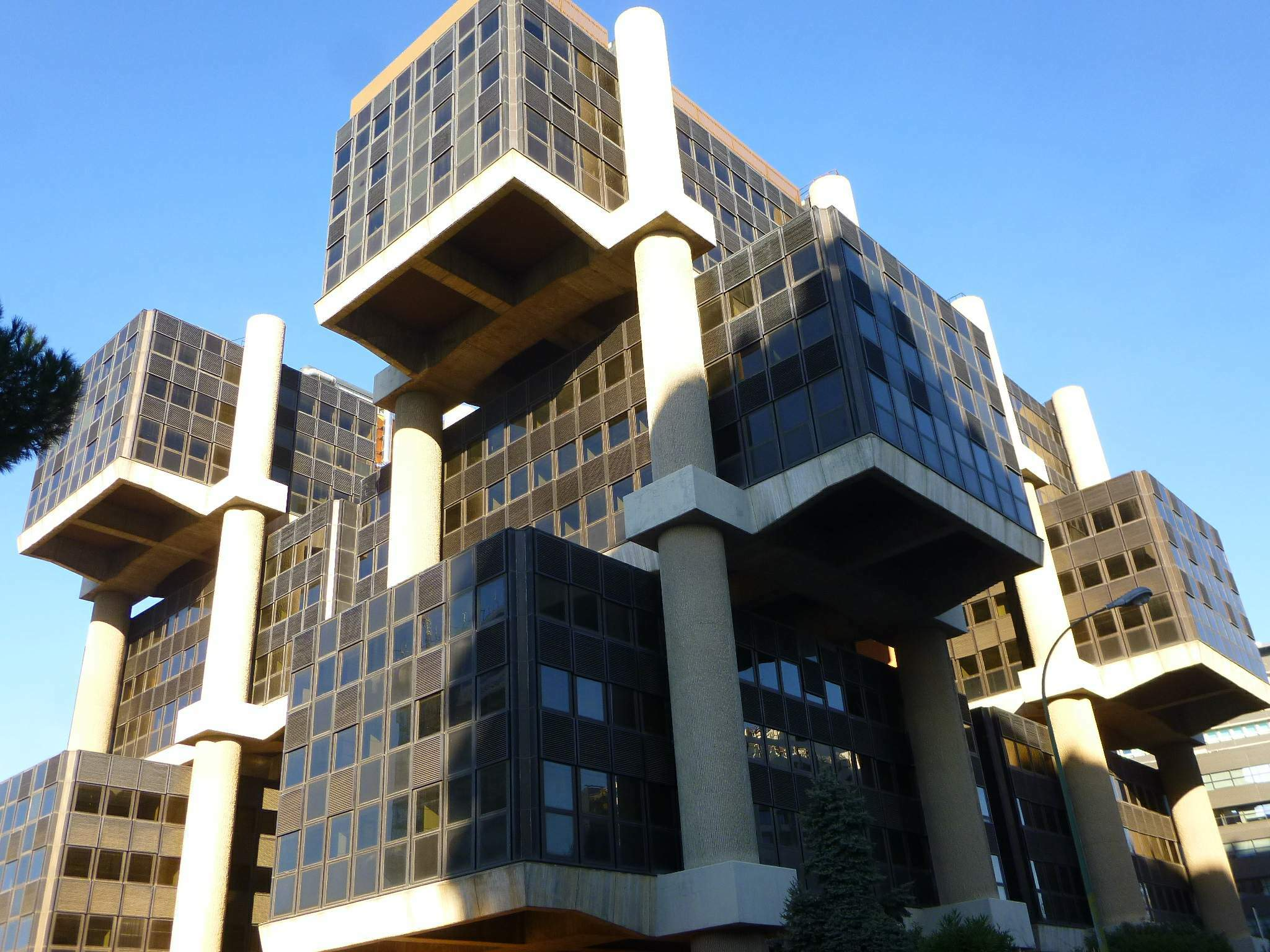 Edificio AGF (Madrid)